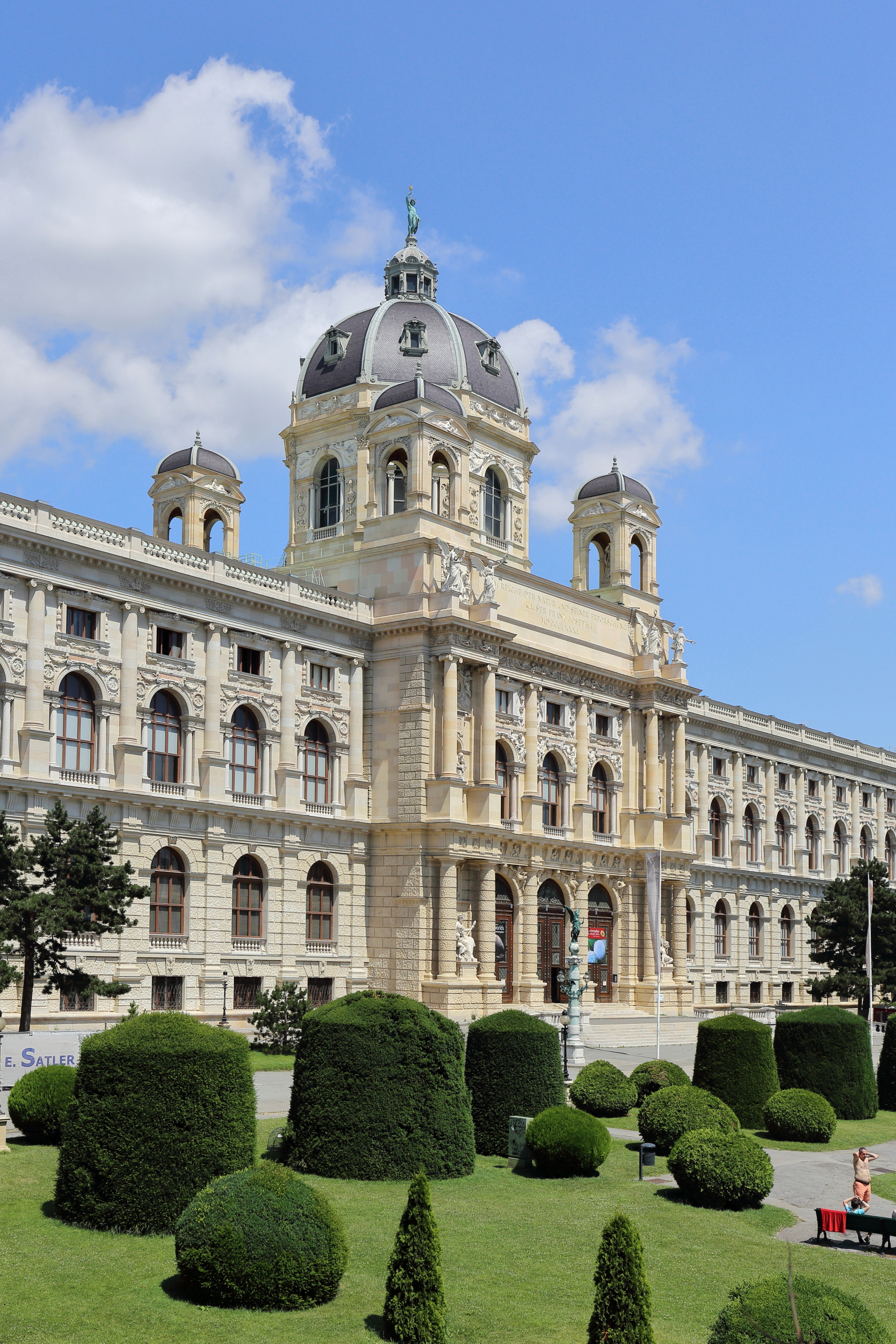 Mittelteil des Naturhistorischen Museums am Burgring im 1. Wiener Gemeindebezirk Inneres Stadt.Das Bauwerk im Stil der italienischen Renaissance ist mit dem Kunsthistorischen Museum symmetrisch zueinander angeordnet und äußerlich spiegelgleich. Es wurde von 1872 bis 1881 von Gottfried Semper und Carl von Hasenauer (nachdem Semper 1876 Wien verlassen hatte, von ihm allein) im Rohbau fertiggestellt und am 10. August 1889 eröffnet. Das viergeschossige Gebäude (Tief-, Hochparterre, I. und II. Stock) mit zwei Innenhöfen ist 170 m lang, im Mittelteil 70 m breit und außen mit rund 250 Bildwerken geschmückt.